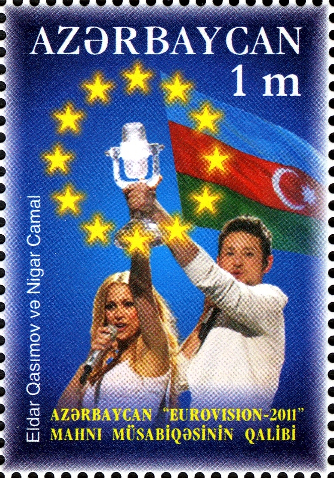 Azərbaycanın 2011 Avroviziya Mahnı Müsabiqəsindəki qələbəsinə həsr olunmuş poçt markası.